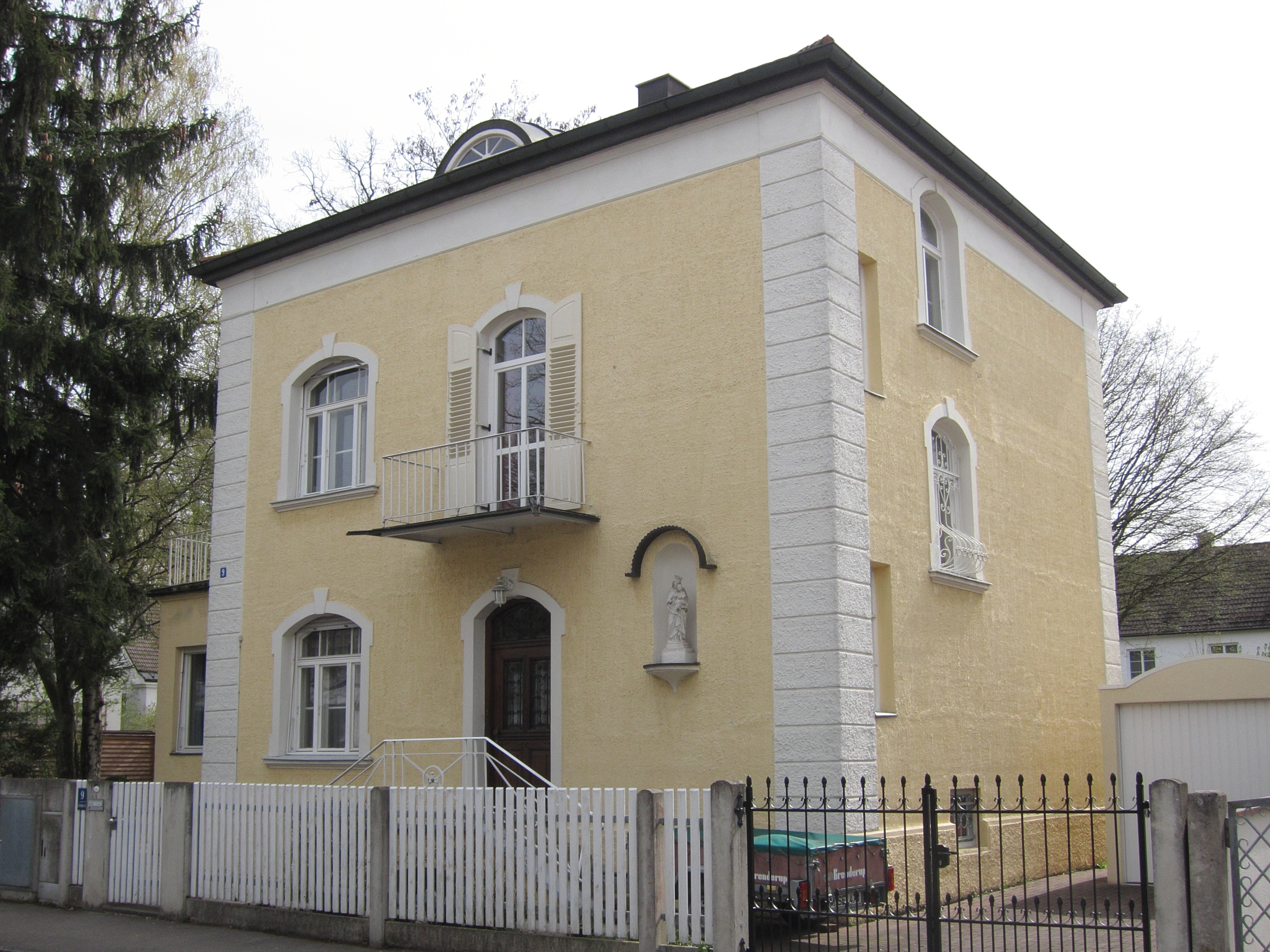 Lichtingerstraße 9; Villa, historisierend, 1903–04 von Josef Kampferseck.